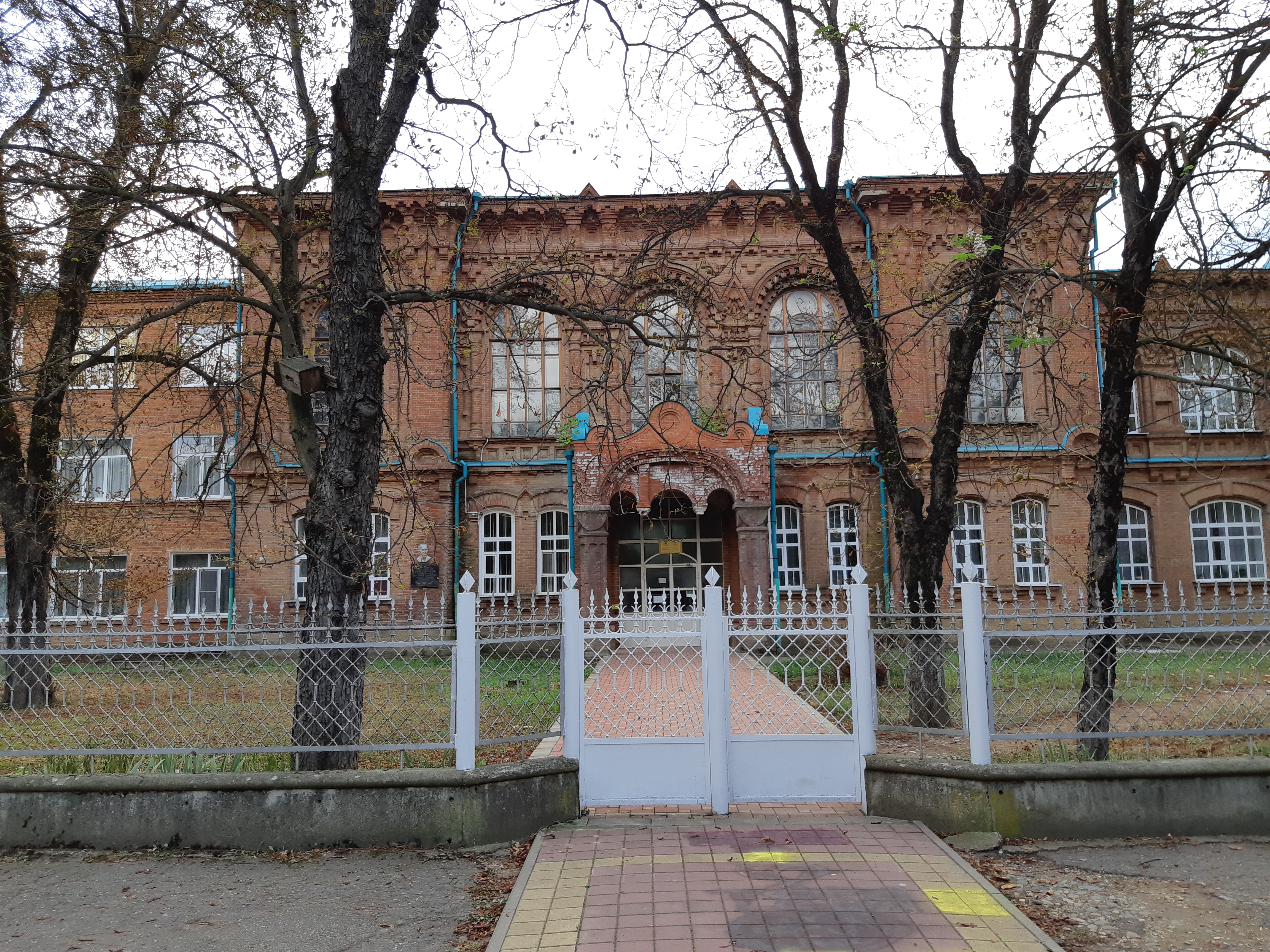 Реальное училище (гимназия женская): улица Пушкина, 173, Майкоп, Адыгея